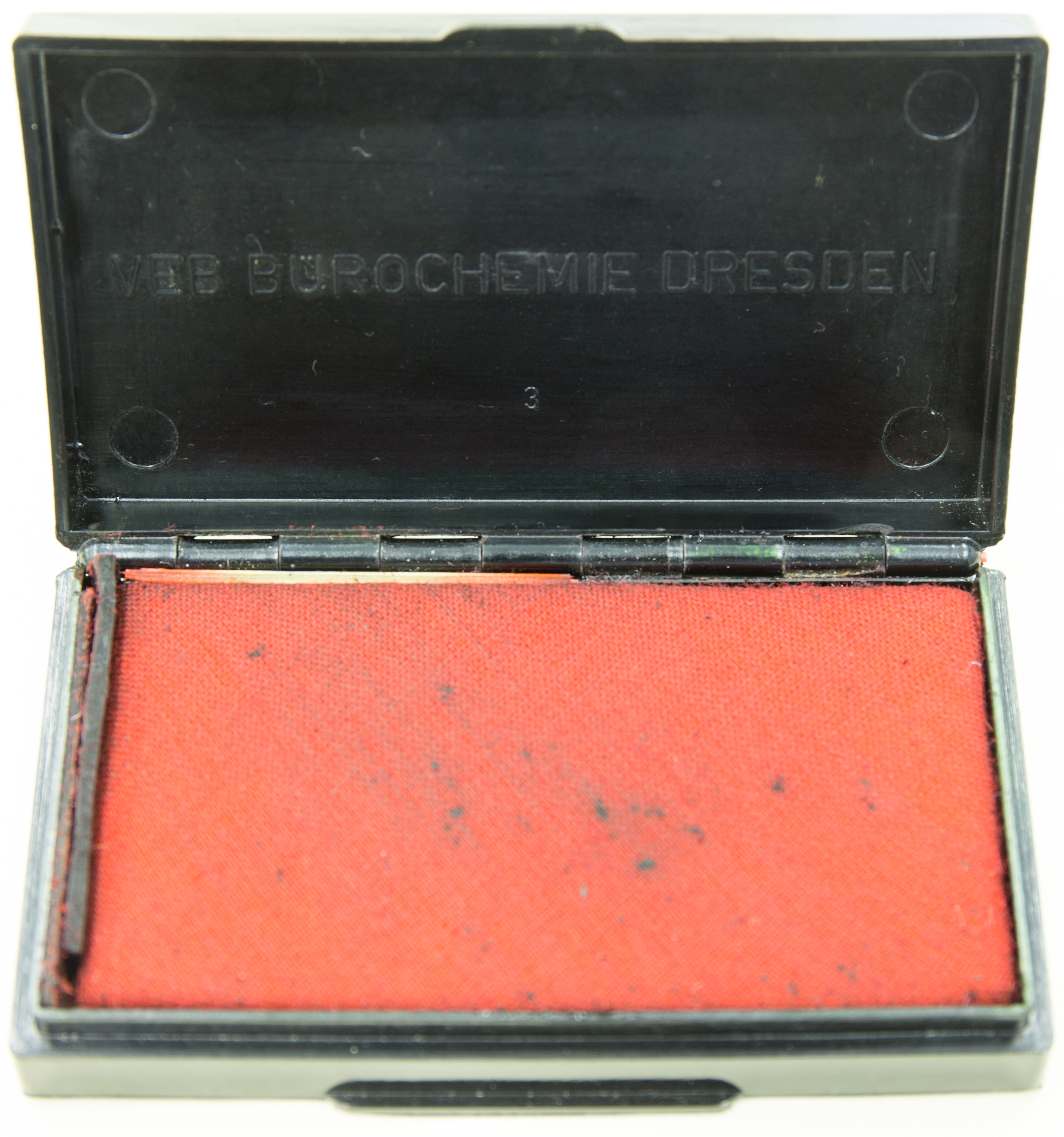 Stempelkissen Barock Indetifikations-Nr.: D´N (9 A) 434/2013 Datierung: 1955-1965 Gebrauchsort: Dresden, Berlin (Ost), DDR; Herstellungsort: Dresden, DDR Hersteller: VEB Bürochemie Dresden Höhe x Breite x Tiefe: 1,5 x 9,5 x 6 cm Ausgabe: Bakelit, Textfiles Zustand: 1. unbedenklich / gut Beschreibung: Kästchen, Stempelkissen aus Bakelit, zum Aufklappen, mit innenliegendem Kissen, derzeit rot; geprägte Abbildung auf dem Deckel: Schloss Moritzburg und Aufschrift Barock. Deckel geprägt: VEB Bürochemie Dresden